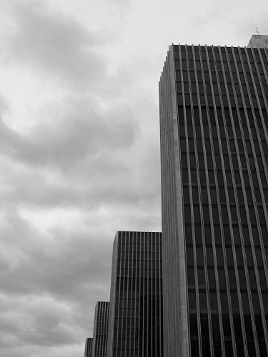 Torri dell'Empire State Plaza di Albany, Stato di New York, USA